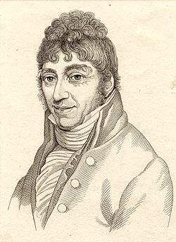 Dutch writer Willem Bilderdijk (1756 - 1831).